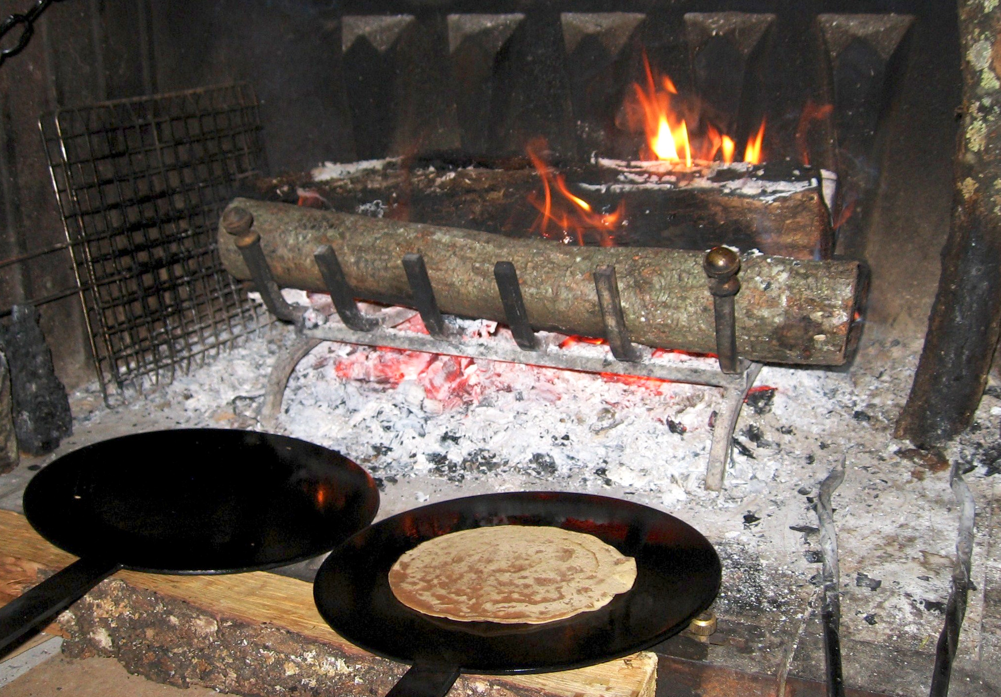 "Storte" appena aperte con neccio cotto, Toscana - Italia